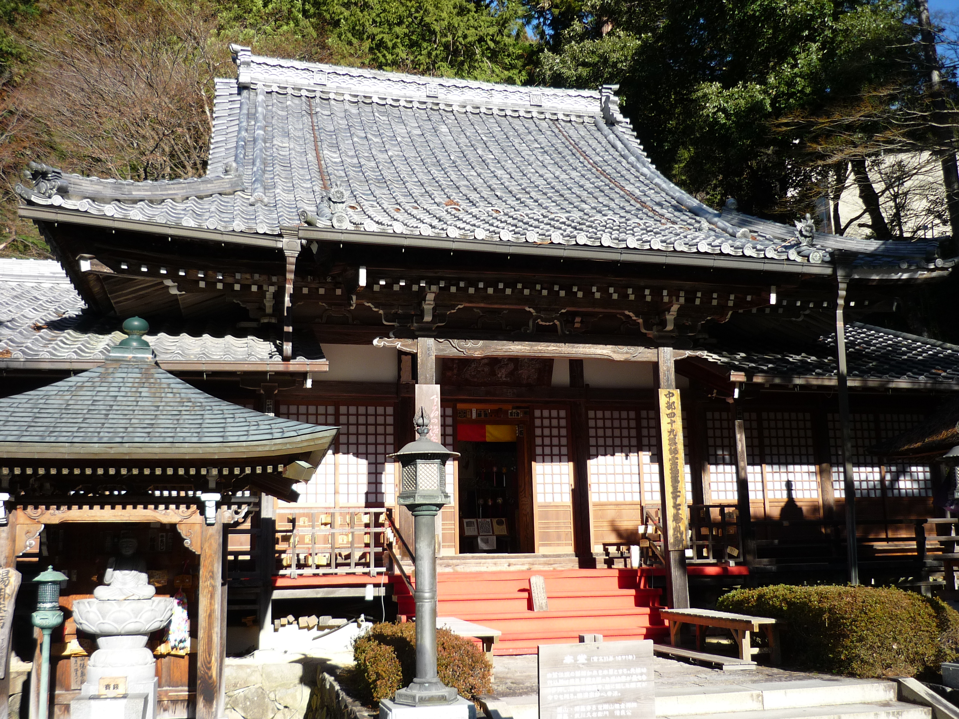 下呂温泉の温泉寺